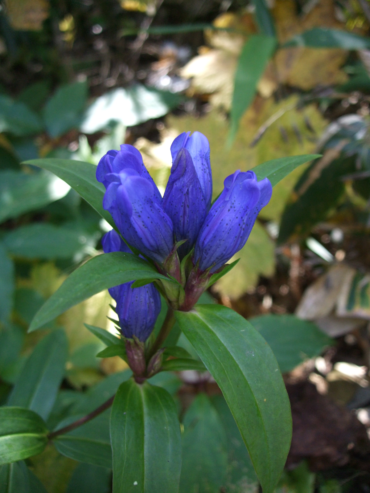 りんどう。2009年9月撮影。